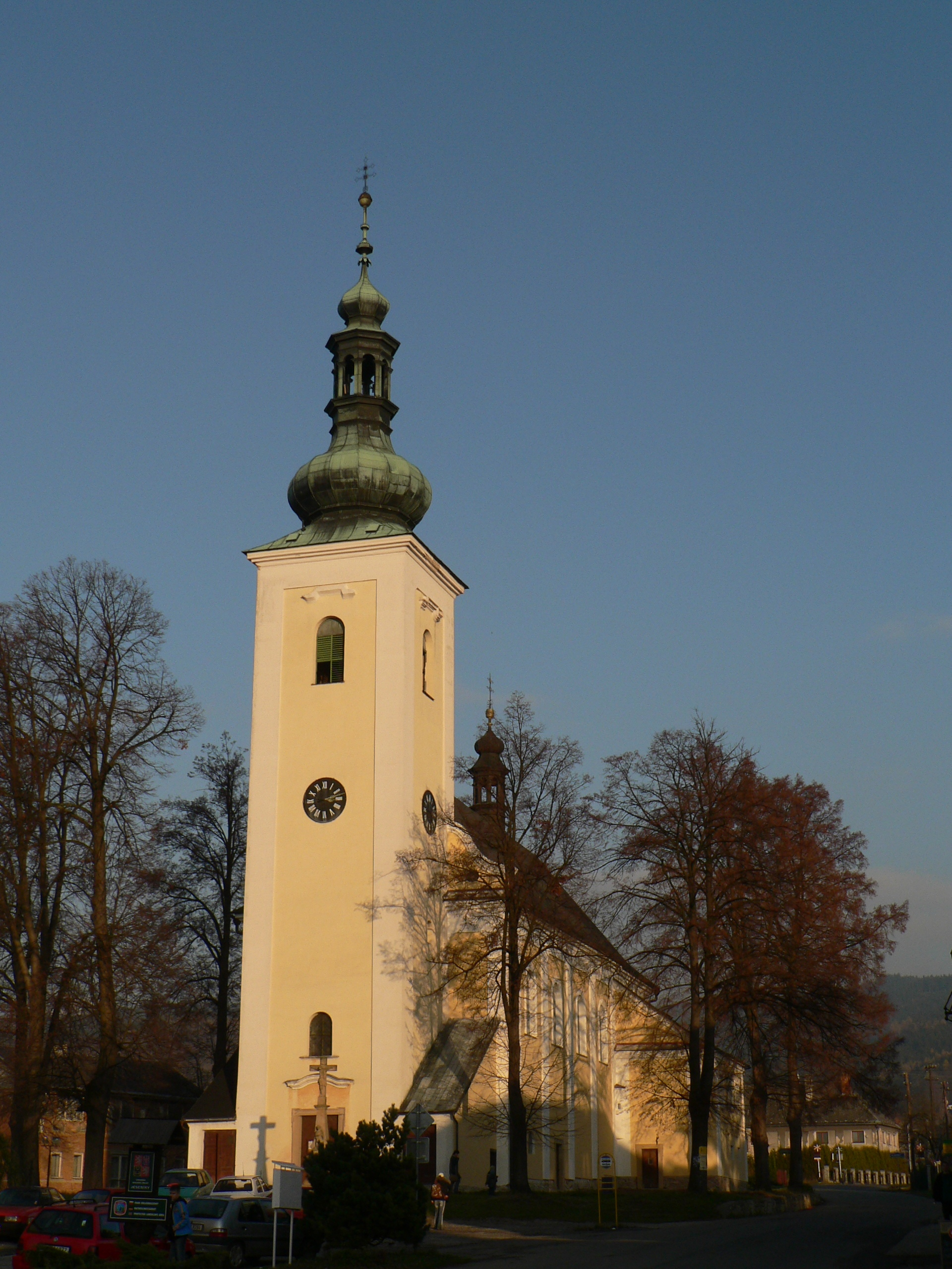 Kostel Narození Panny Marie (Nový Malín)